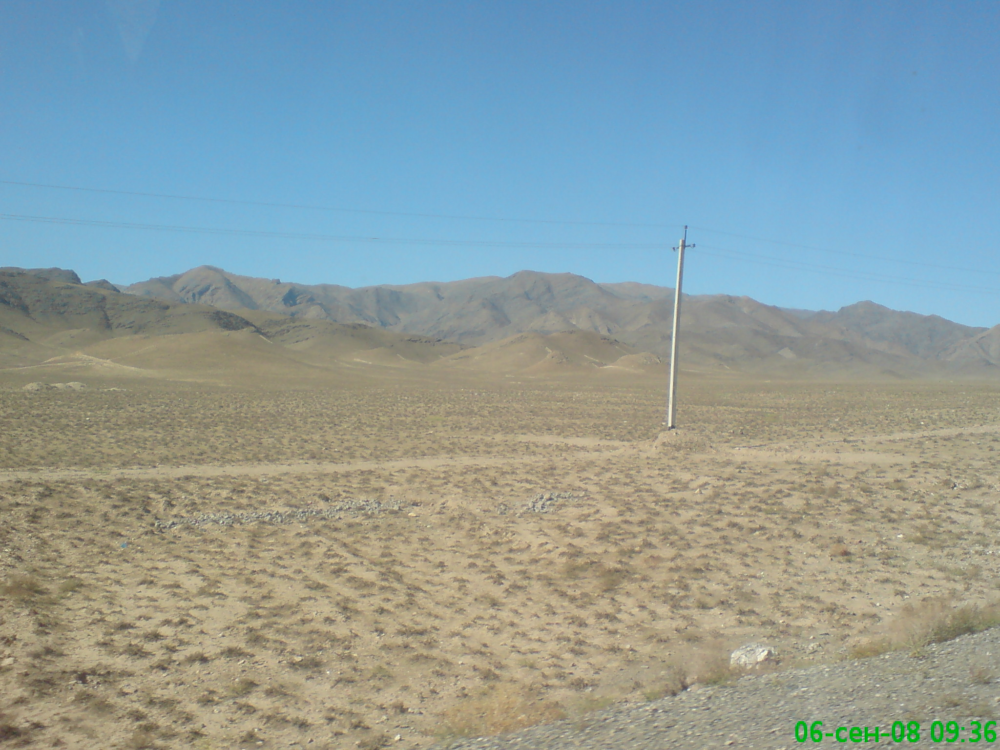 Северные отроги хребта Нуратау на границе с Кызылкумом